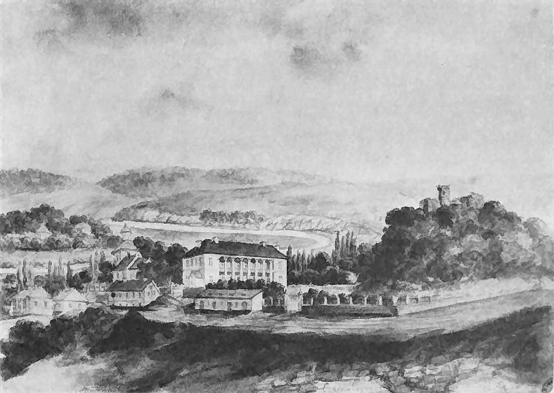 Czarnokozince: Czarnokozince